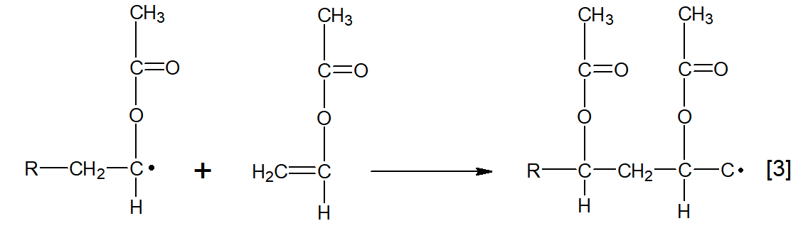 Equação relacionada à etapa de propagação